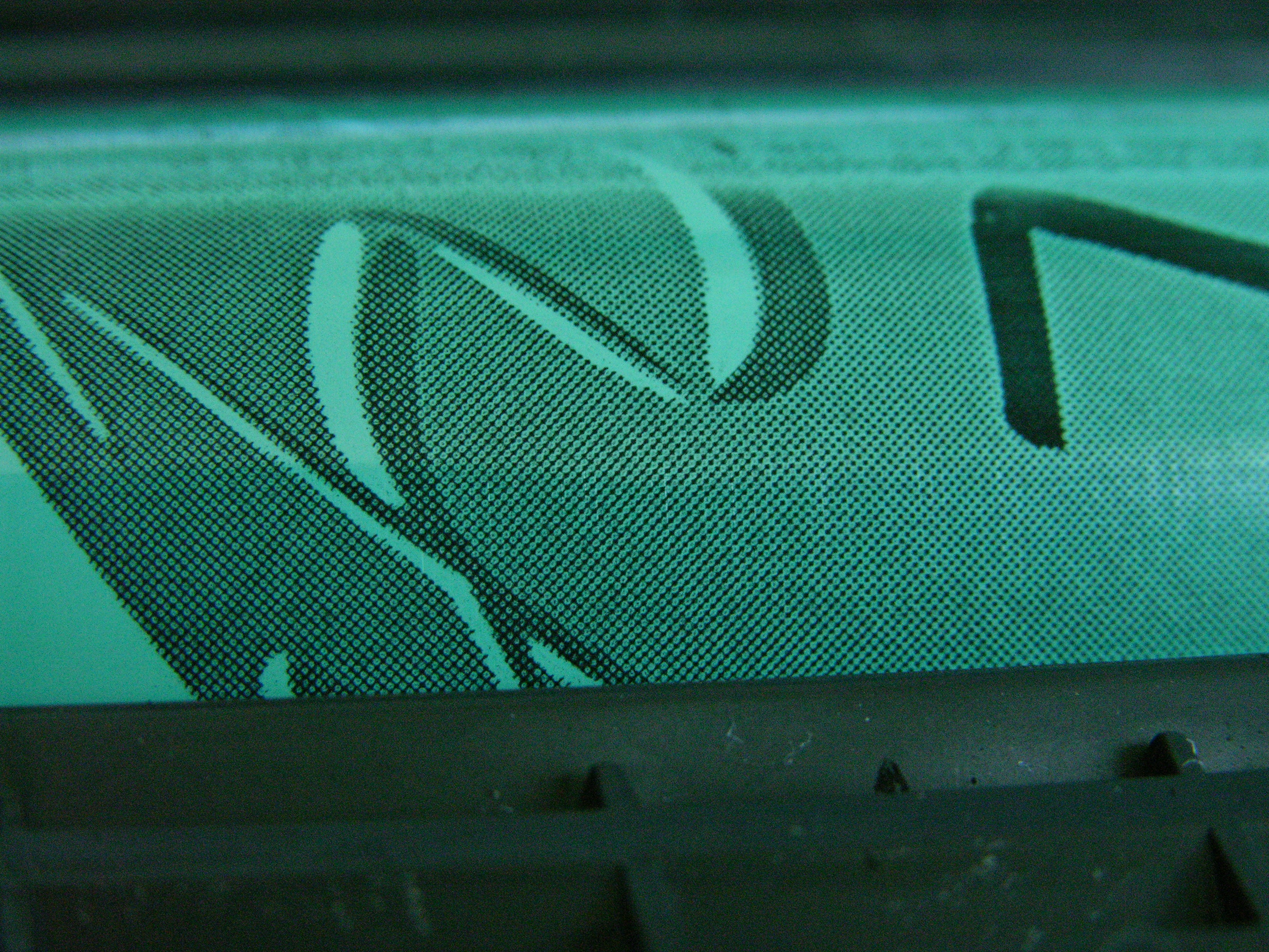 rouleau photosensible d'imprimante laser sur lequel c'est déposé le toner au cours d'une impression interrompue.